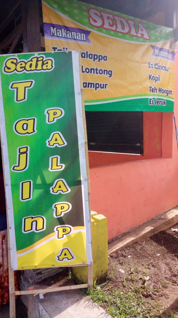 Warung Tajin Palappa